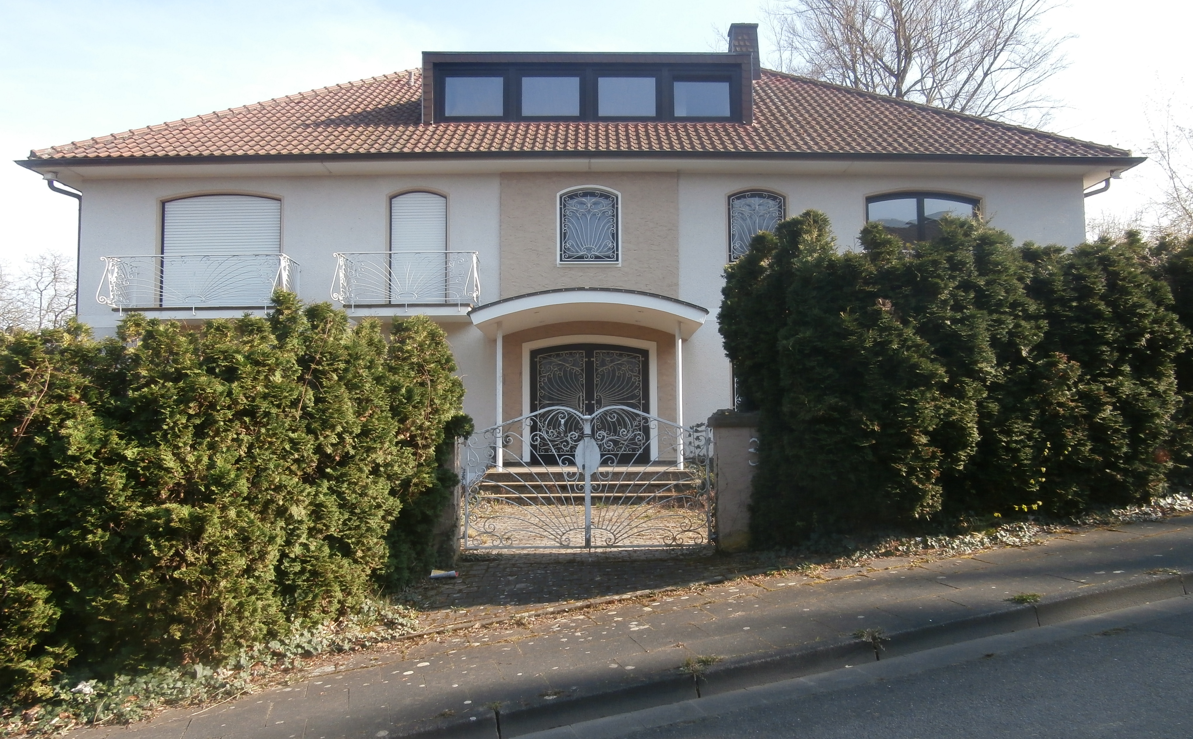 Ehemalige Residenz der Botschaft von Nepal, Elsternweg 3, Mehlem, Bad Godesberg: Ansicht vom Elsternweg